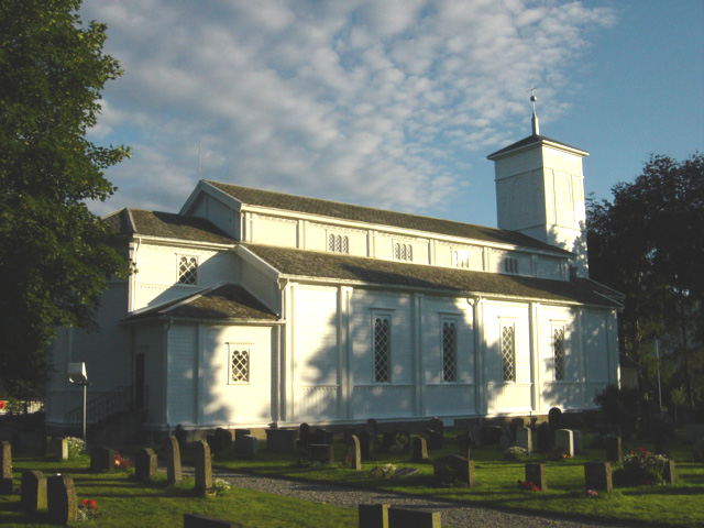 Nesset and the Nesset kirke